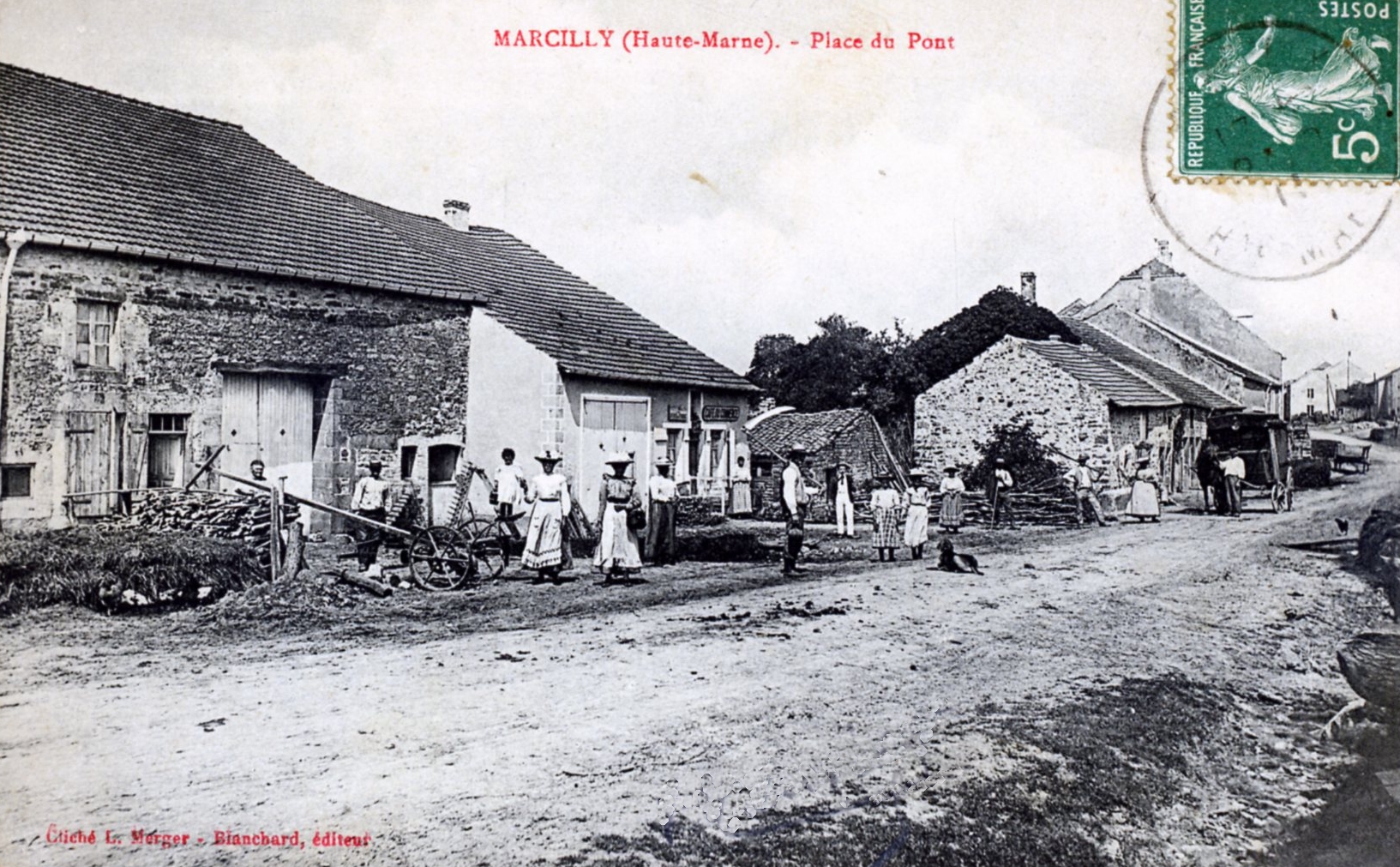 Carte postale vers 1910